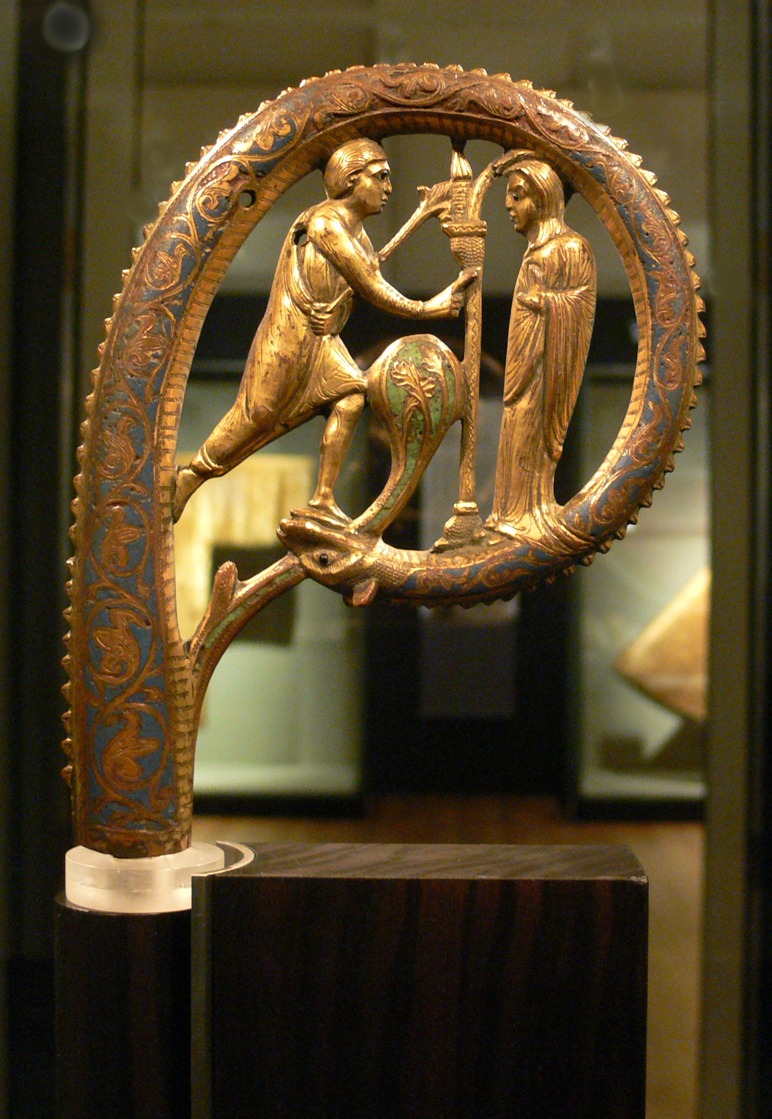 Diözesanmuseum Bamberg So genannter Stab des hl. Otto, Limoges, 1. Hälfte 13. Jh., Kupfer vergoldet mit Emaileinlagen